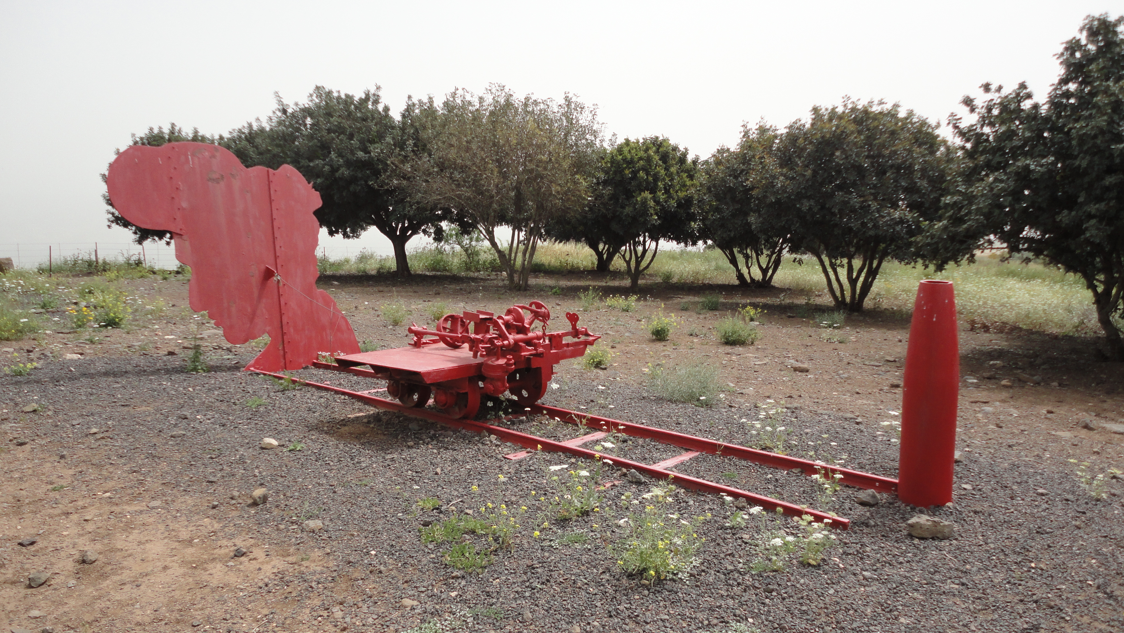 Sculpture